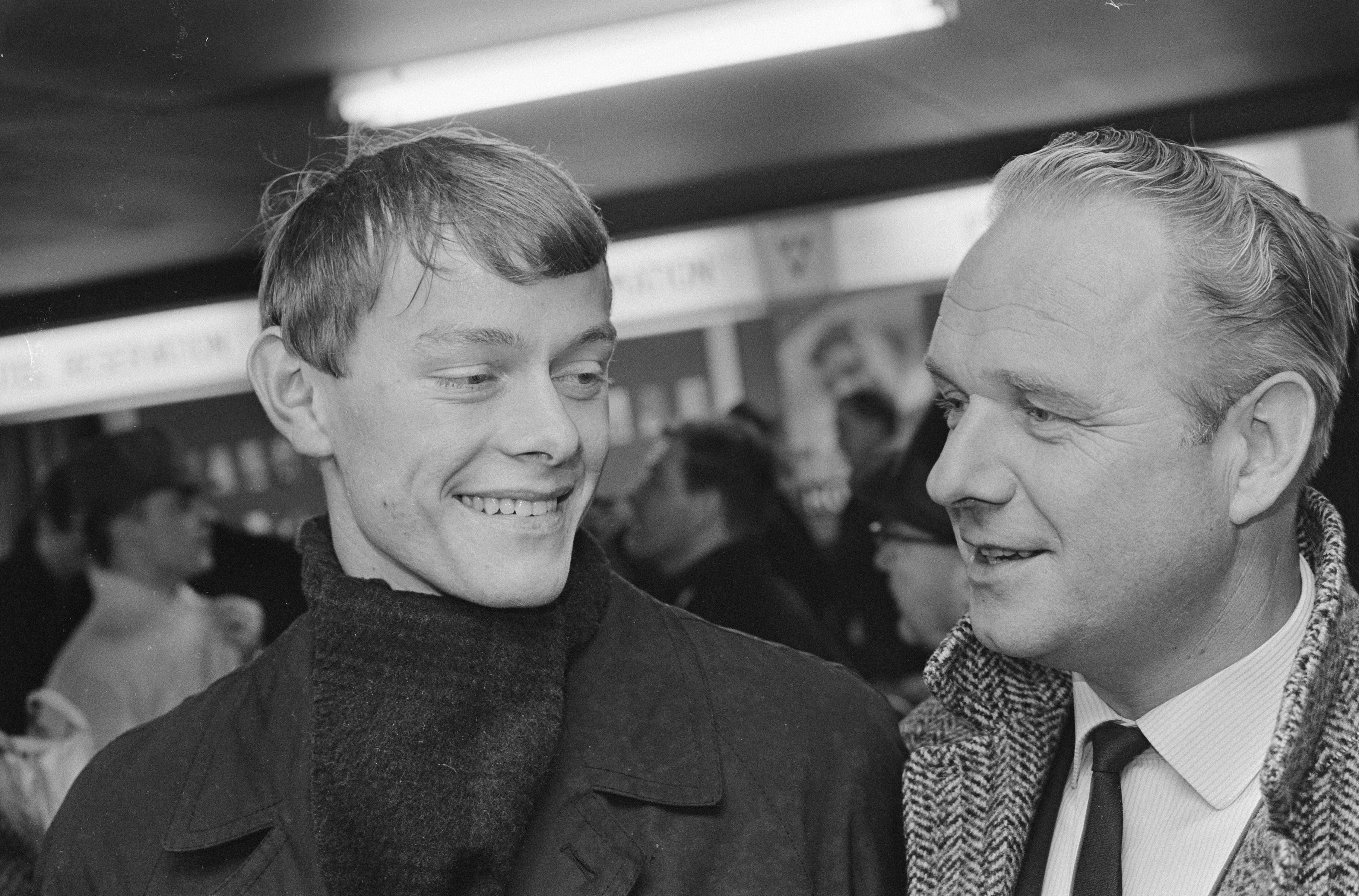 Photographie du footballeur danois Henning Munk Jensen (à gauche) et de l'entraîneur Poul Petersen par Ron et Henny Kroon / Anefo.